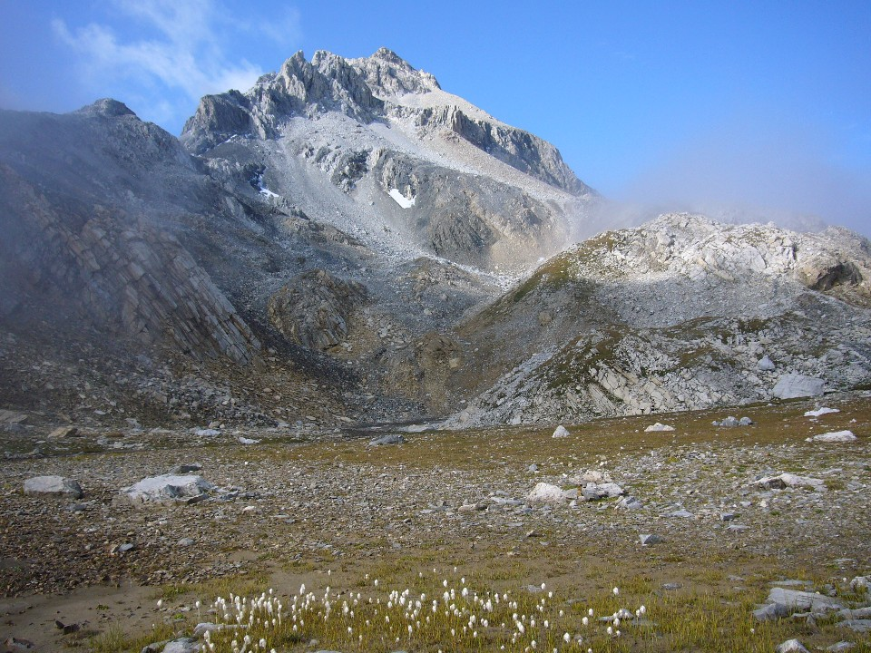 Alperschällihorn von einer kleinen Ebene auf 2500 Metern im Nordosten